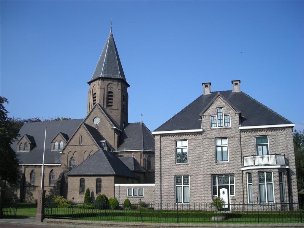 Sint Fredericuskerk (church) in Steggerda